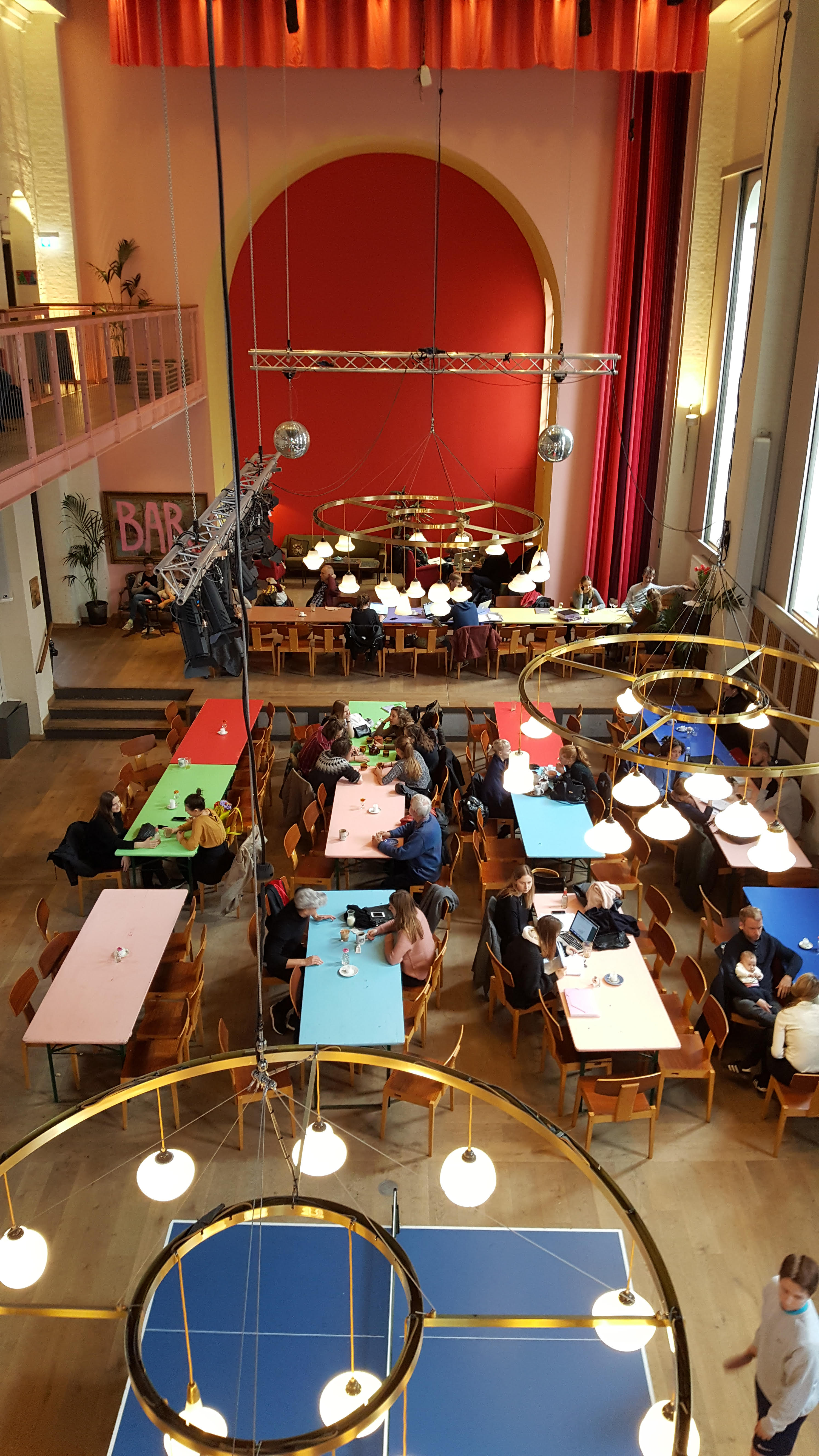 Folkehuset Absalon på Vesterbro i København. Kirkerummet i den tidligere Absalons kirke er nu bl. a. spisesal.